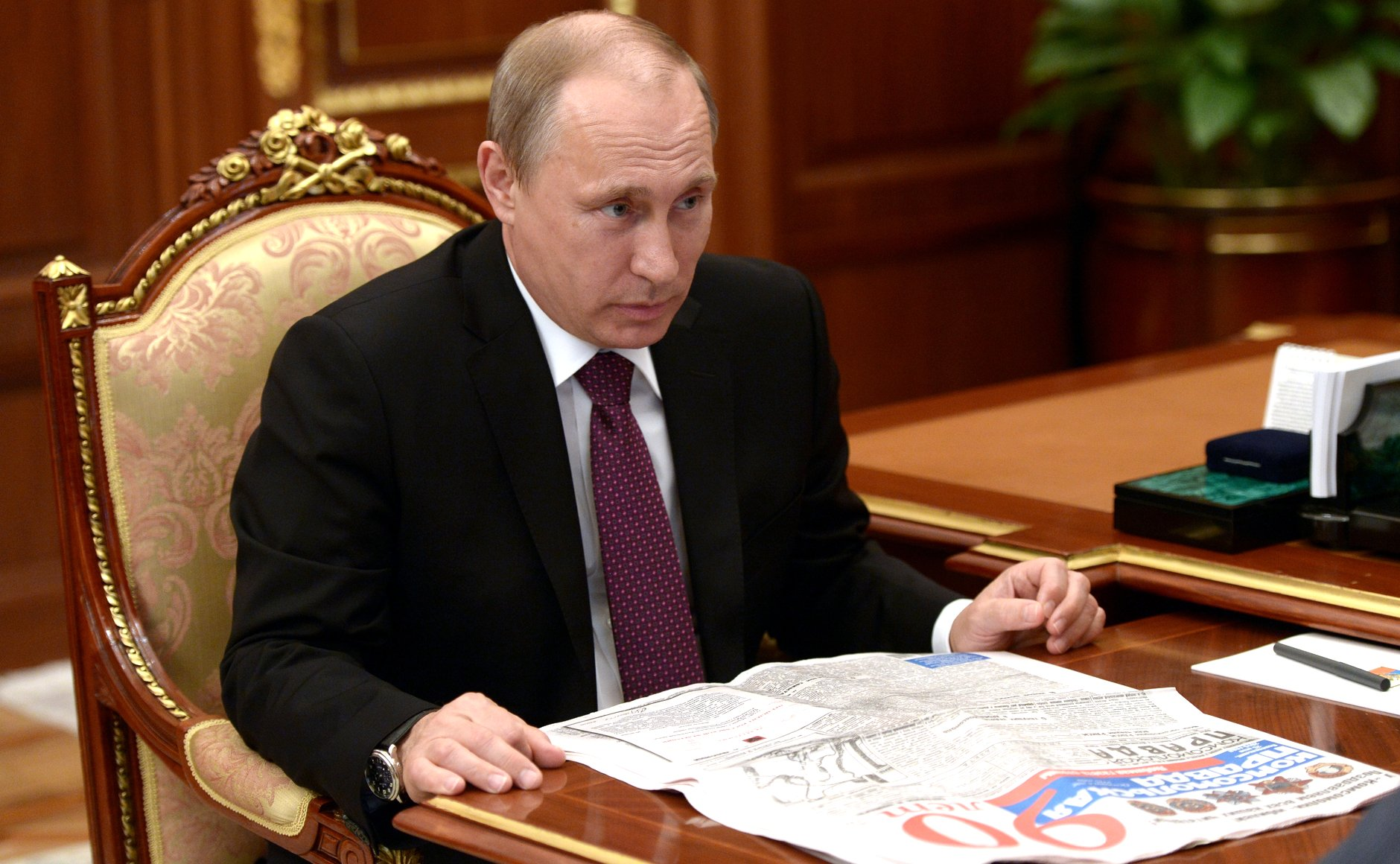 Встреча Владимира Путина с главным редактором газеты «Комсомольская правда» Владимиром Сунгоркиным